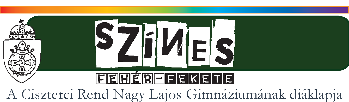 A Ciszterci Rend Nagy Lajos Gimnáziumának Színes Fehér/Fekete című diákújságjának logója 2005-től napjainkig.